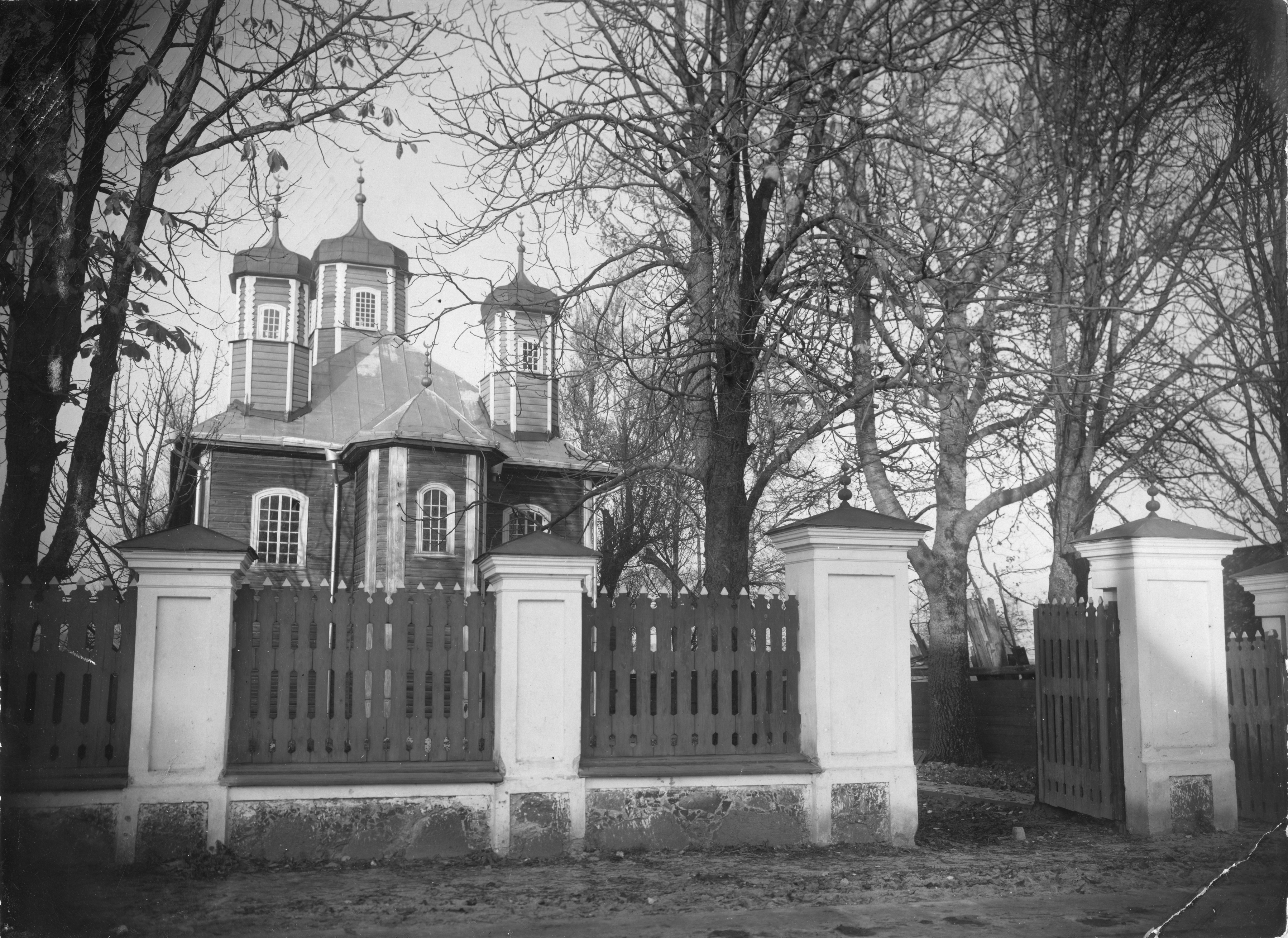 Беларуская (тарашкевіца): Слонім (Słonim), вуліца Татарская (vulica Tatarskaja). Мячэт